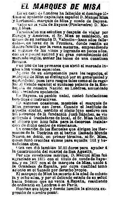 El Marqués de Misa, necrológica